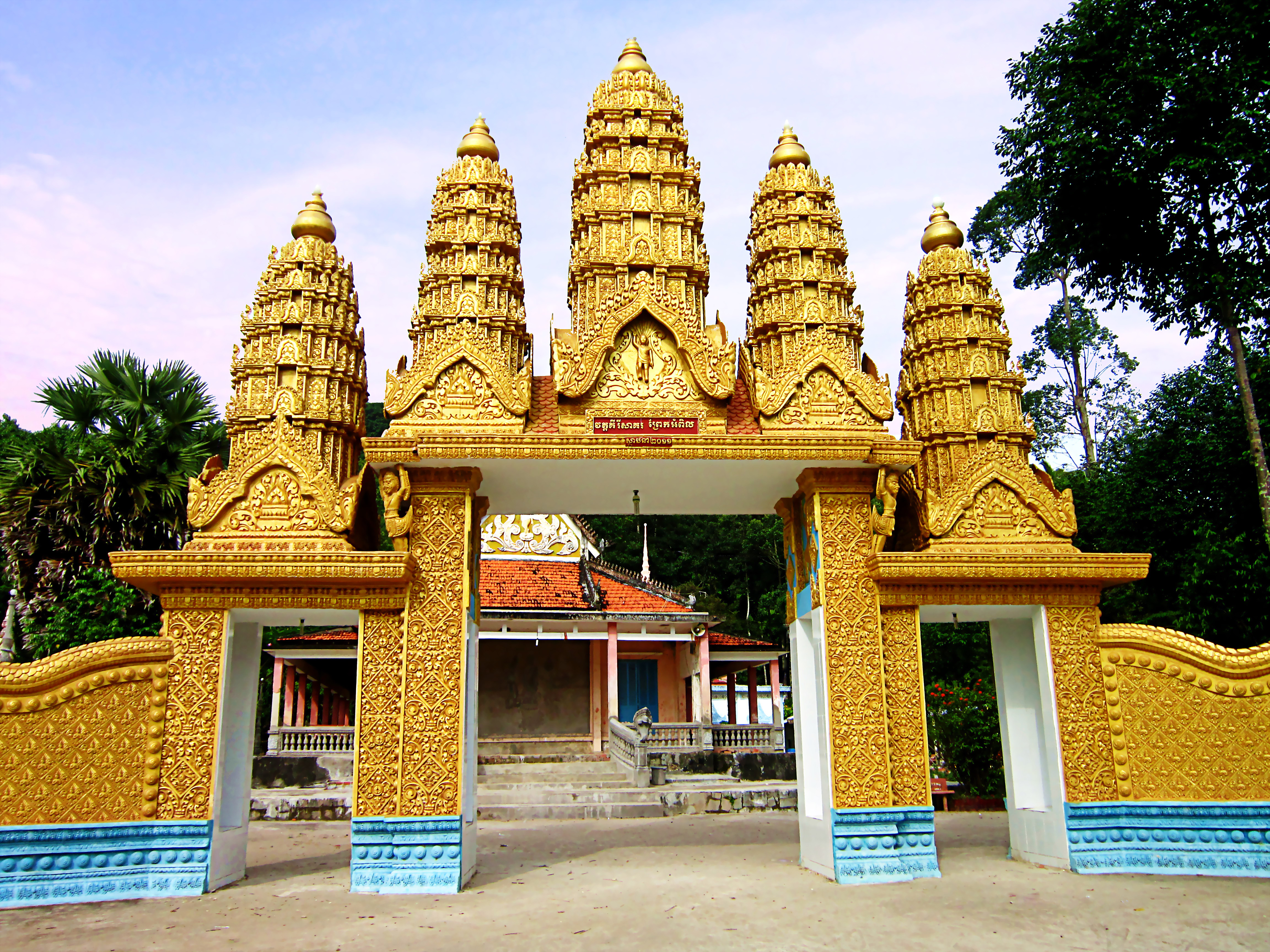 Chùa Kyry Sakoo của tộc người Khmer ở Hòn Me, thuộc xã Thổ Sơn, huyện Hòn Đất, tỉnh Kiên Giang, Việt Nam.